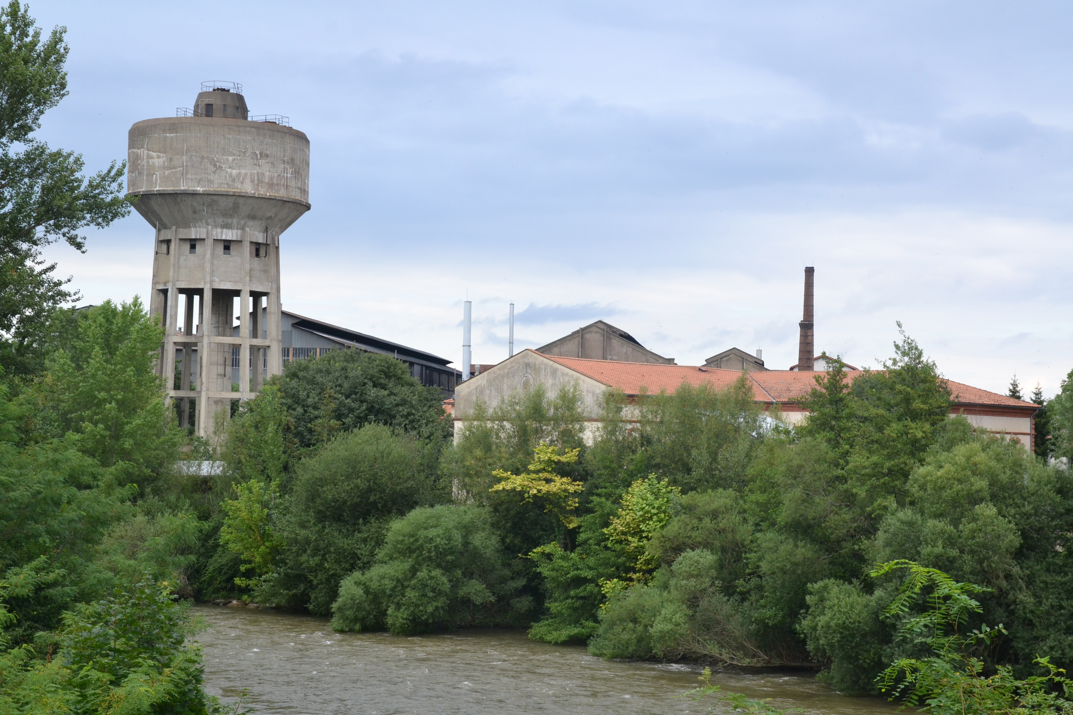 Une partie de l'ensemble industriel métallurgique de Pamiers, au bord de l'Ariège (Ariège, France).